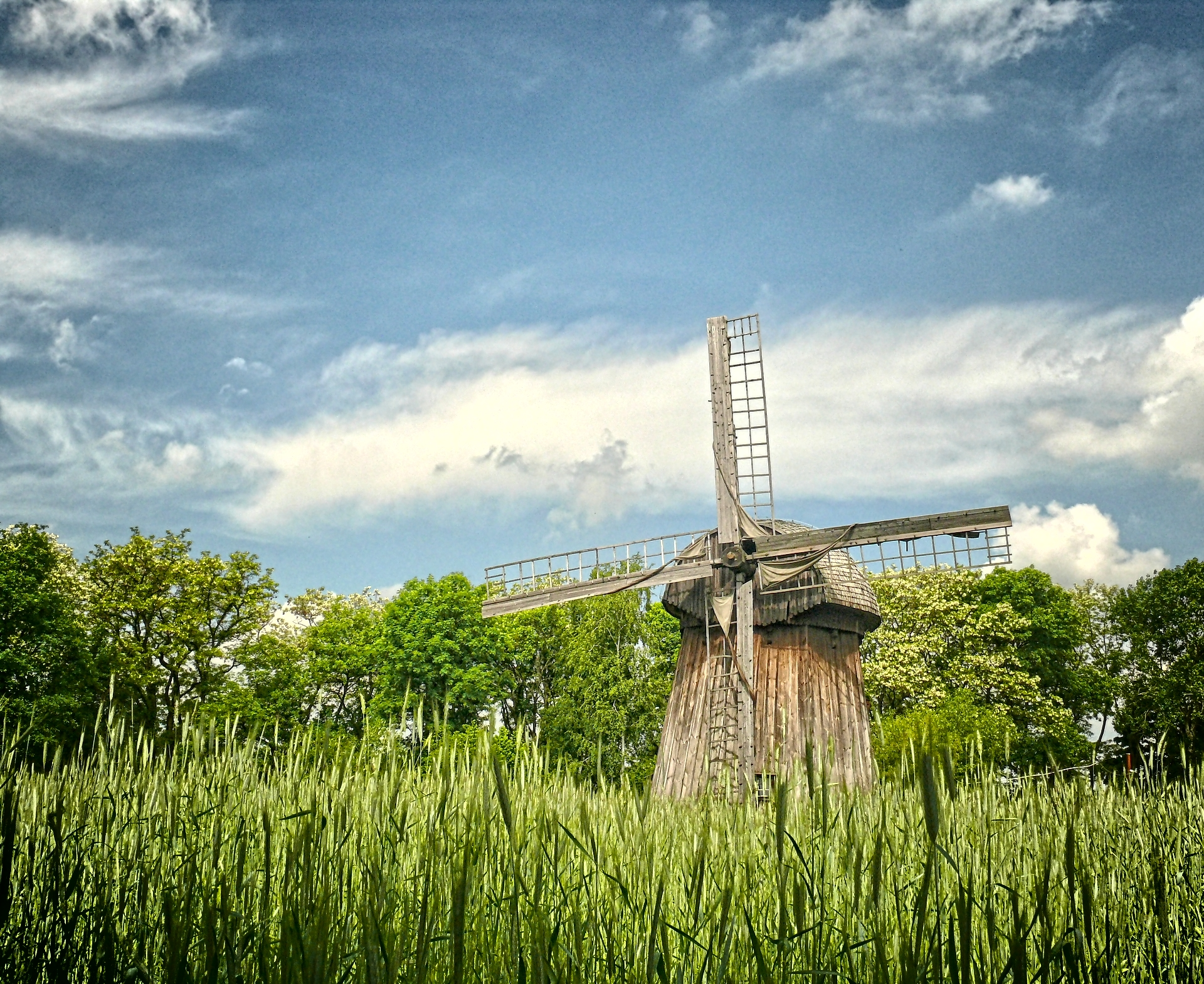 Lublin, ul. Warszawska 96 - wiatrak w Muzeum Wsi Lubelskiej (zabytek nr A/813 z 31.03.1981)